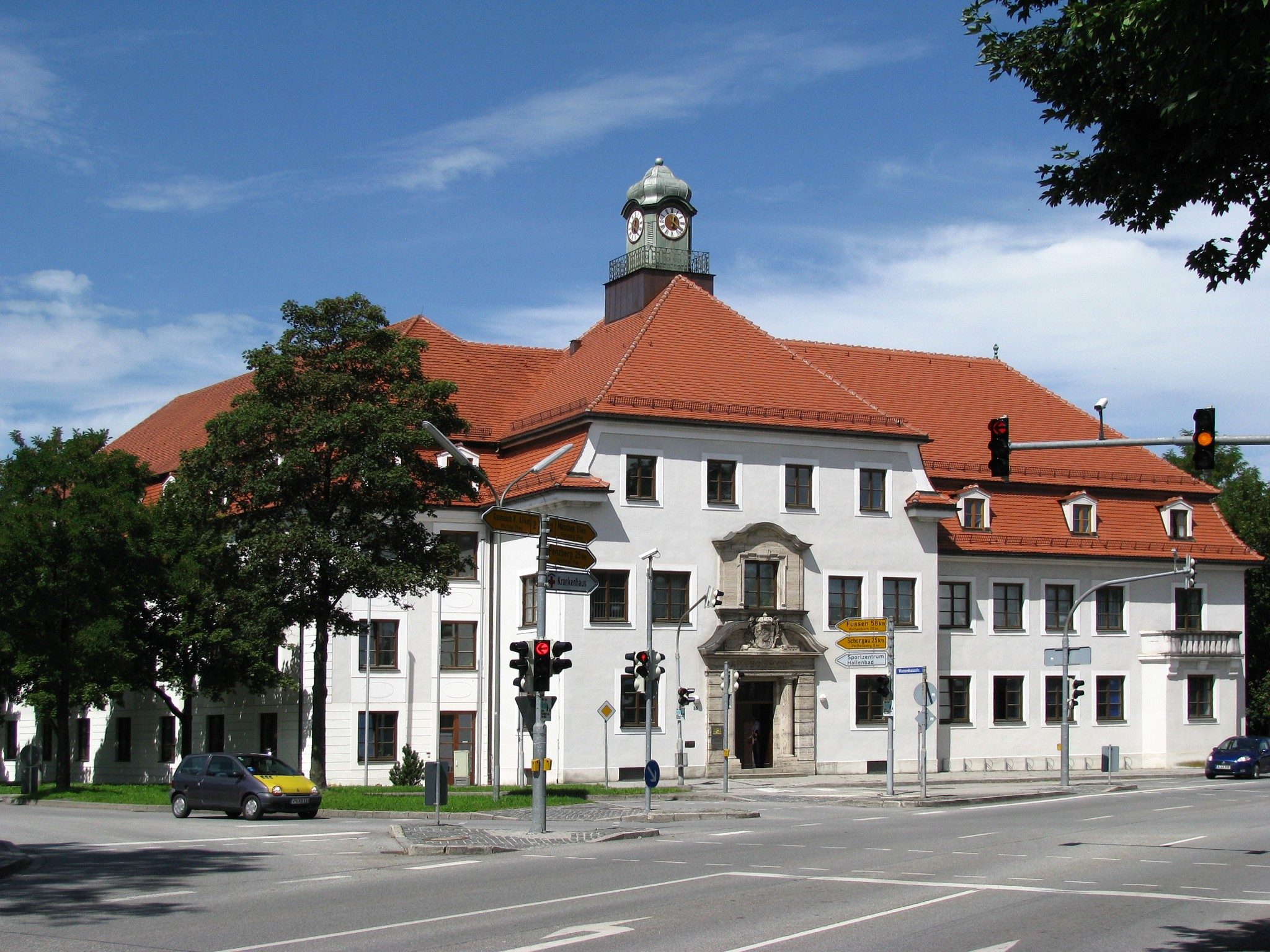 Gebäude des Amtsgerichts Weilheim in Oberbayern in der Alpenstraße 16